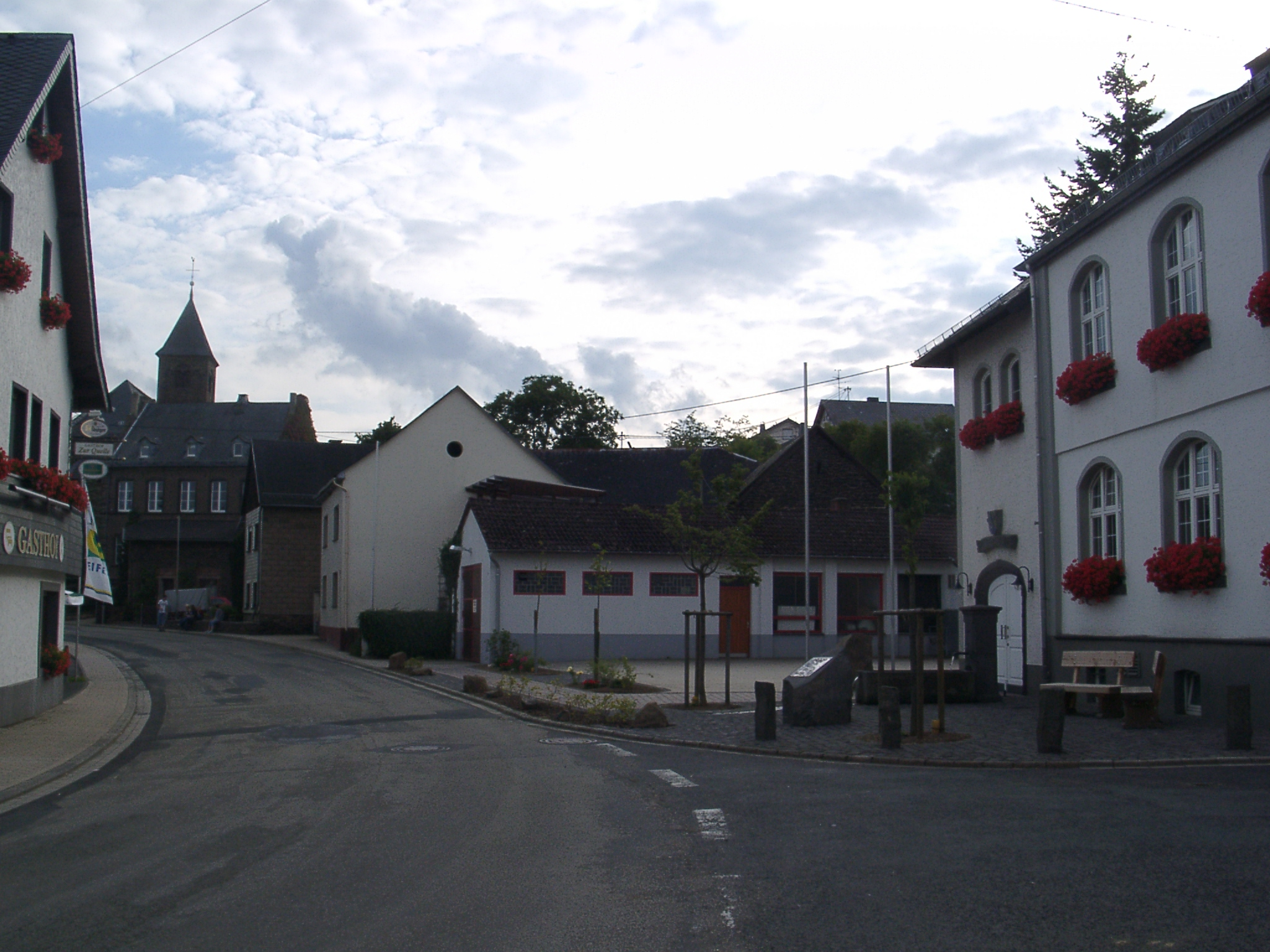 Ortsmitte von Boos (Eifel), links das Gasthaus Quelle